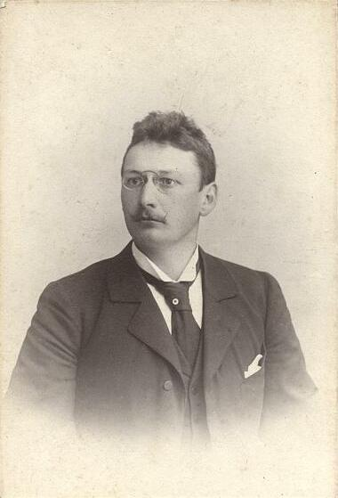 Pomolog-pedagog Karel Němec (1839-1901)